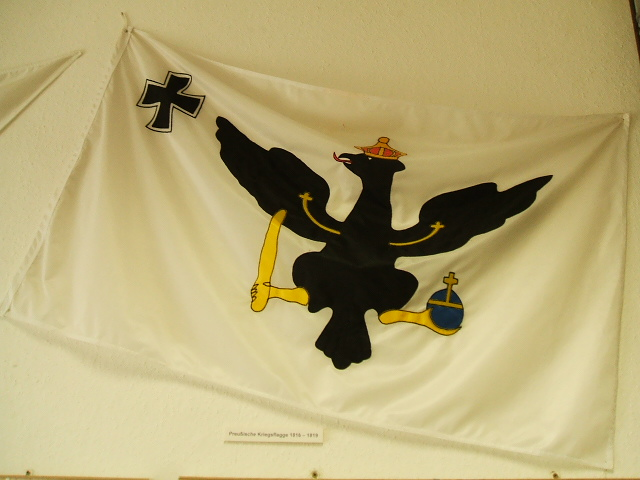 Stralsund, Marinemuseum.